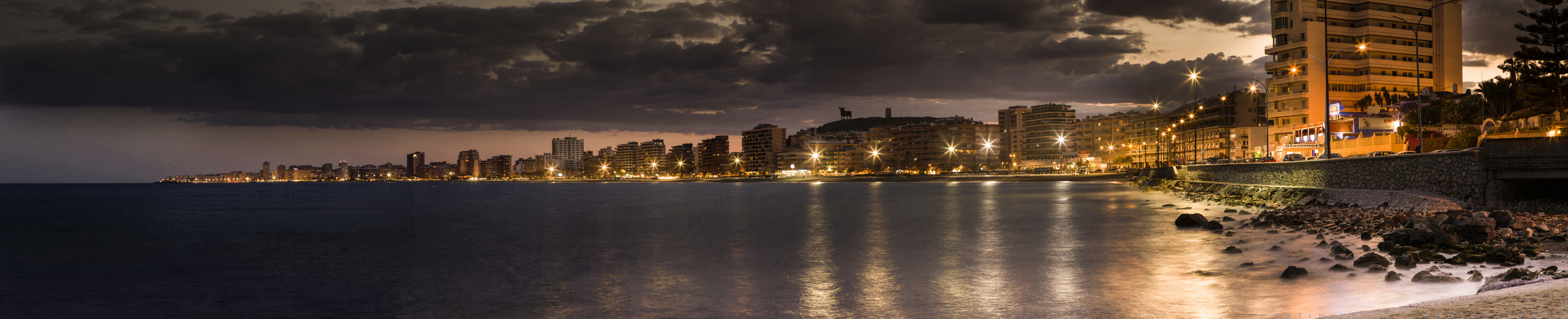 Vista panorámica de Fuengirola (Costa del Sol, provincia de Málaga).